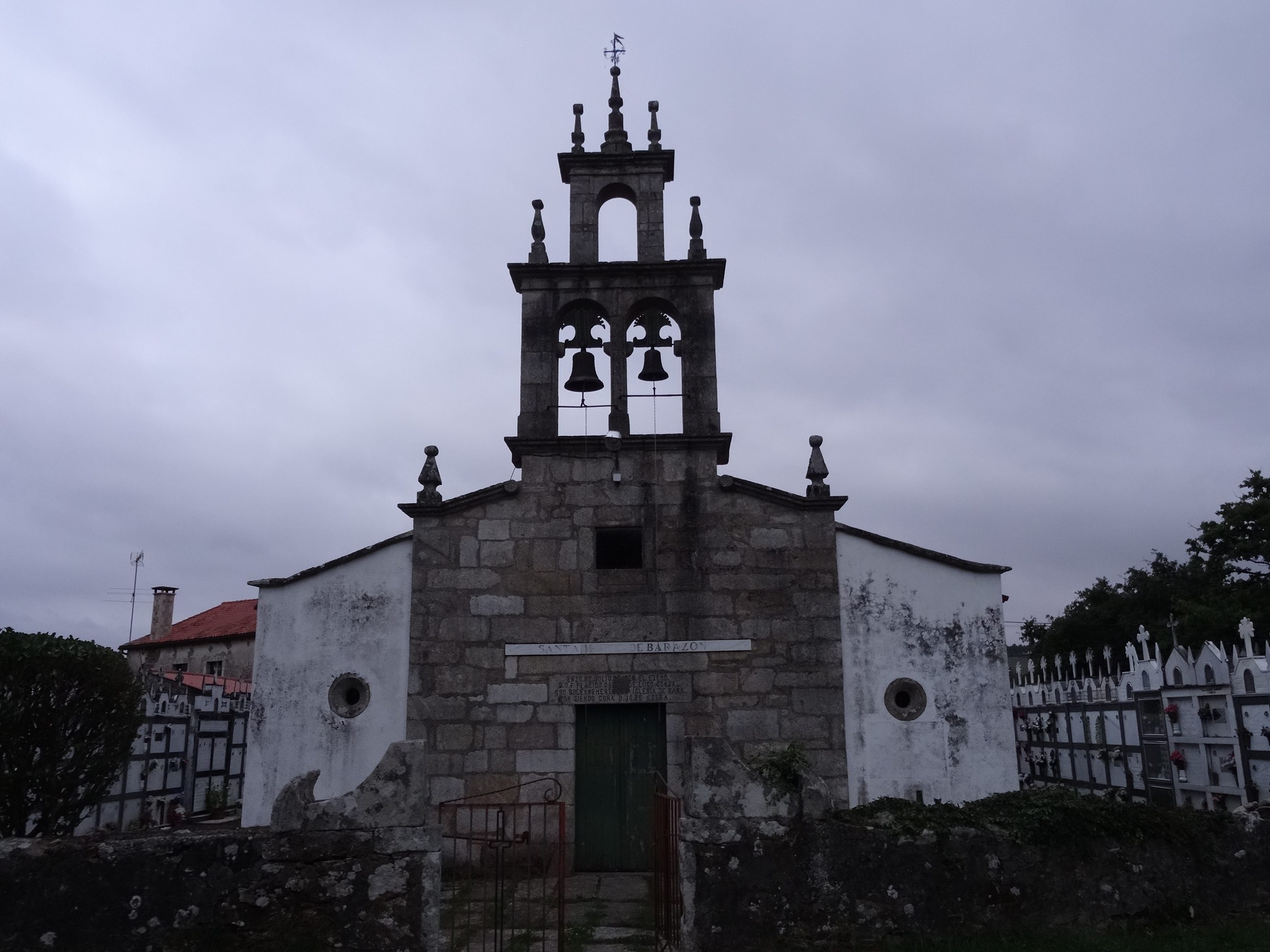 Igrexa de Santa María de Barazón, concello de Santiso, provincia da Coruña.